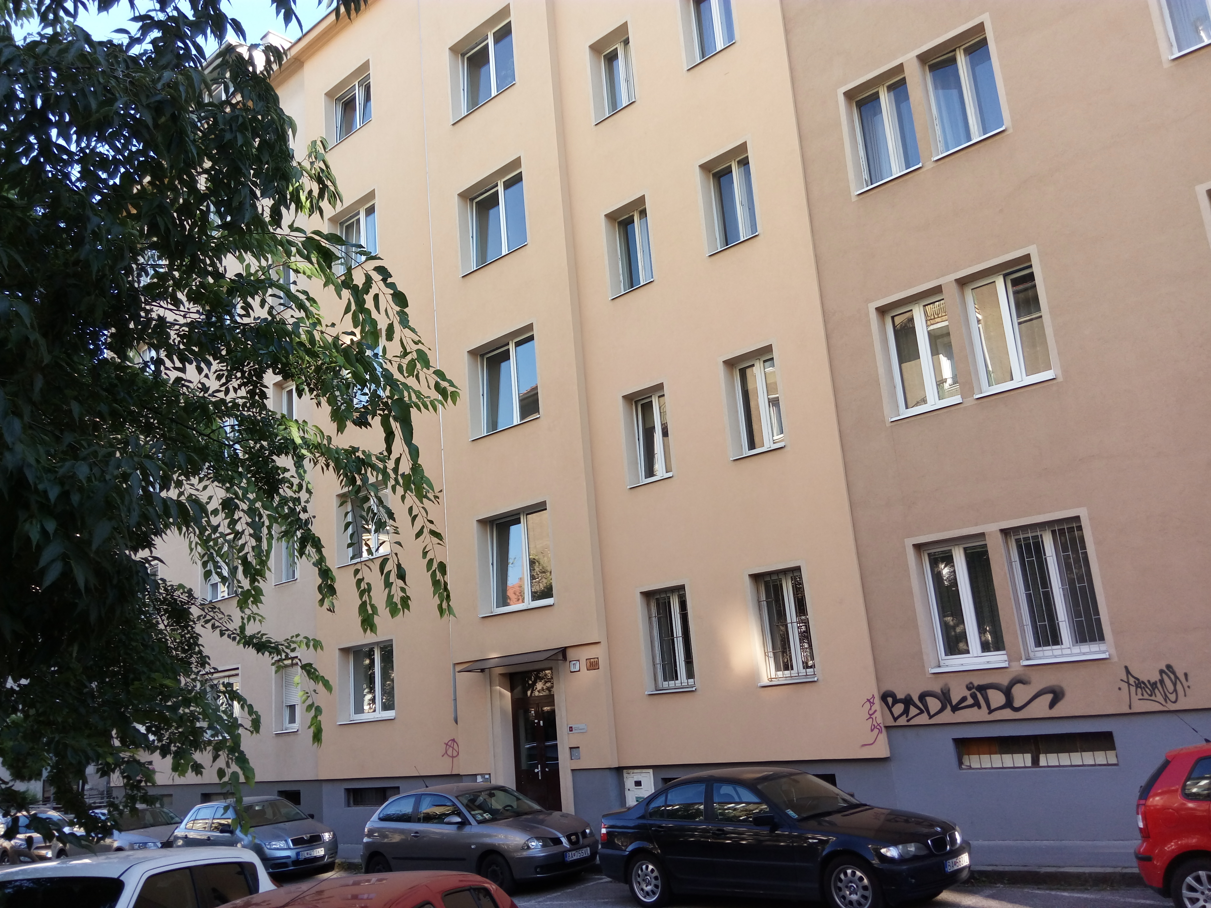 Povraznícka 11, Staré Mesto, Bratislava